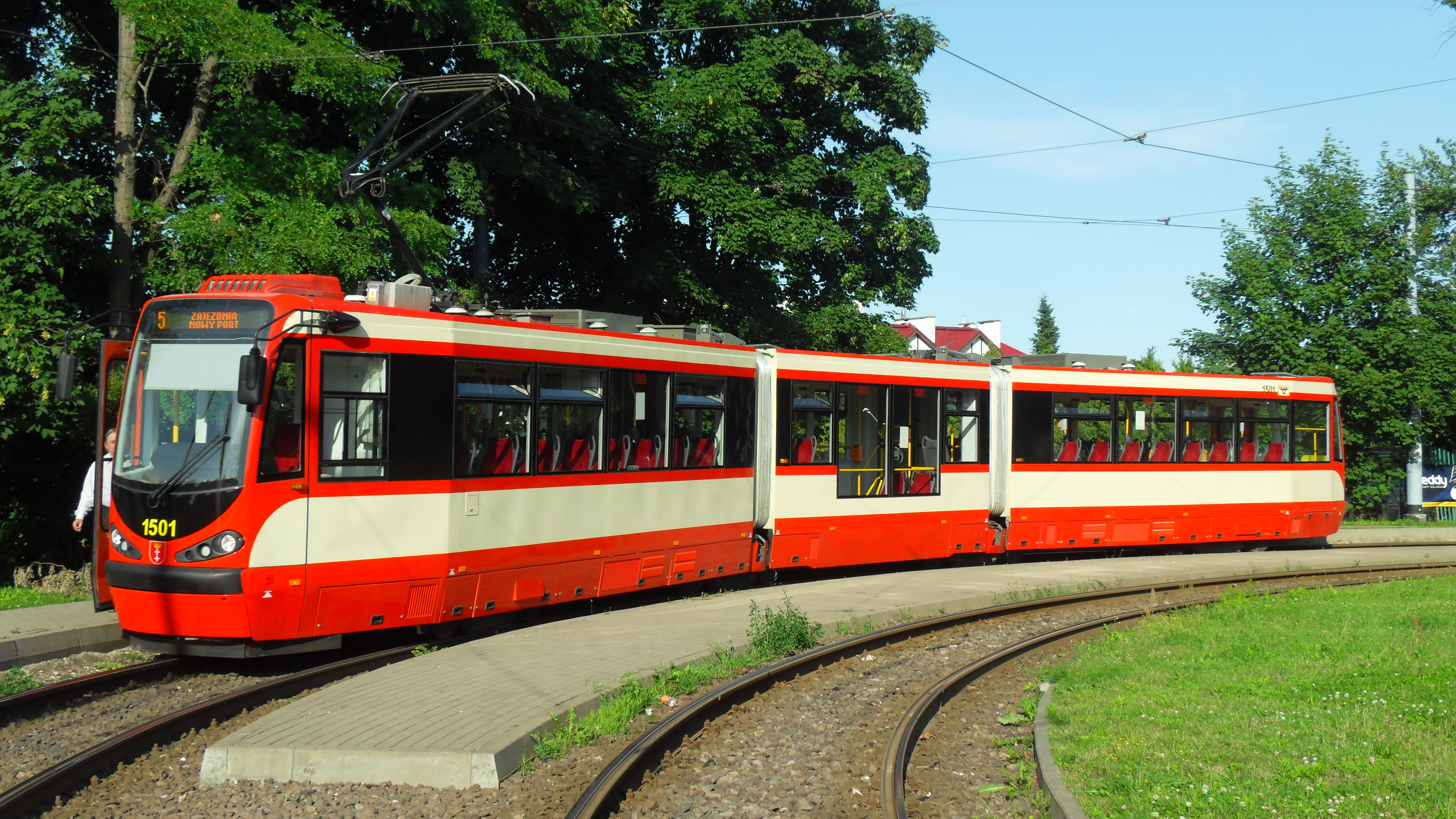 Konstal 114Na (#1501) w Gdańsku po modernizacji, pętla tramwajowa Strzyża.